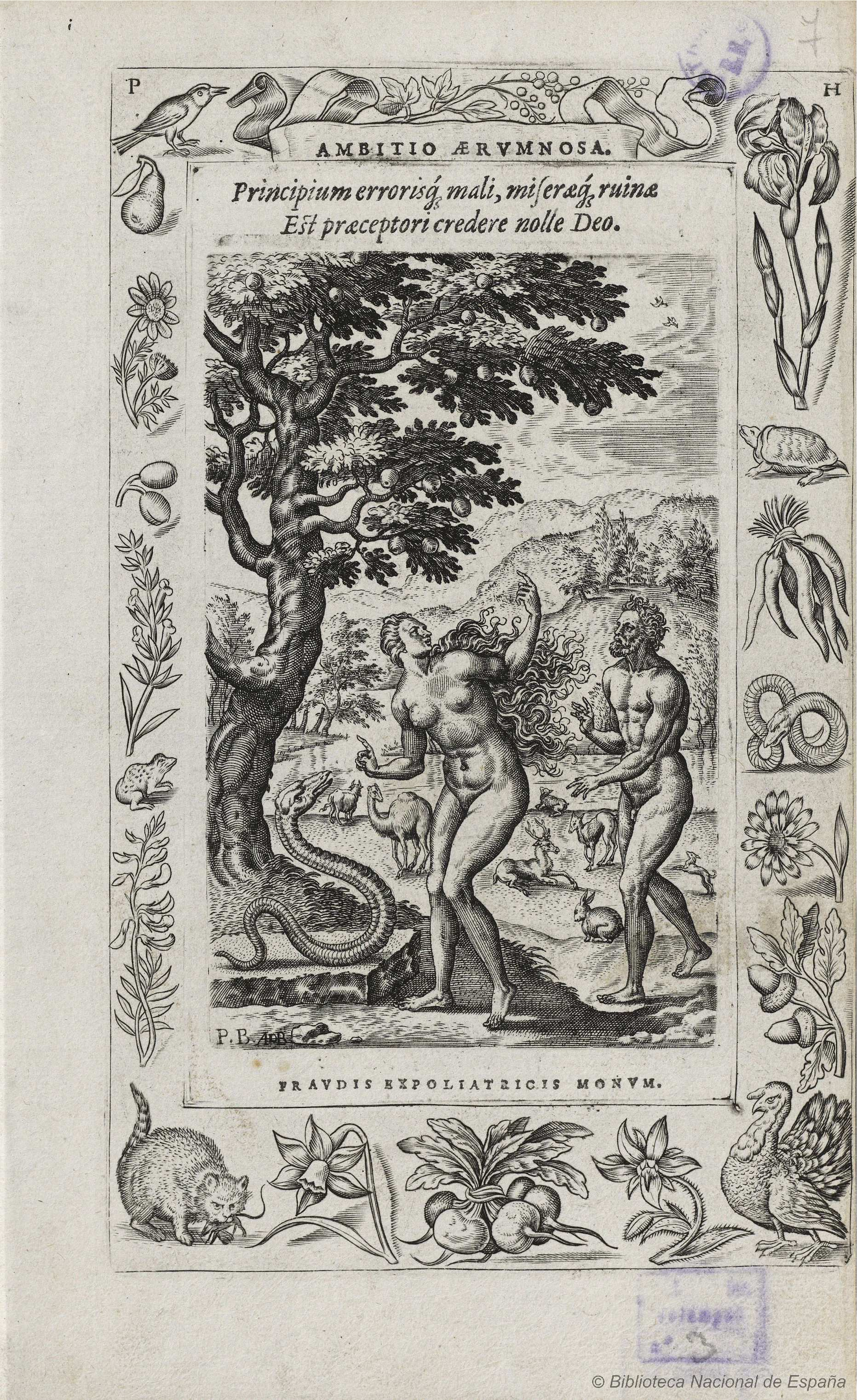 Humanae salutis monumenta, Amberes, Cristóbal Plantino, prototipógrafo regio, 1571. Grabado de Abraham de Bruyn por dibujo de Pieter van der Borcht